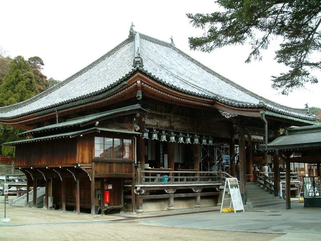 中山寺の本堂